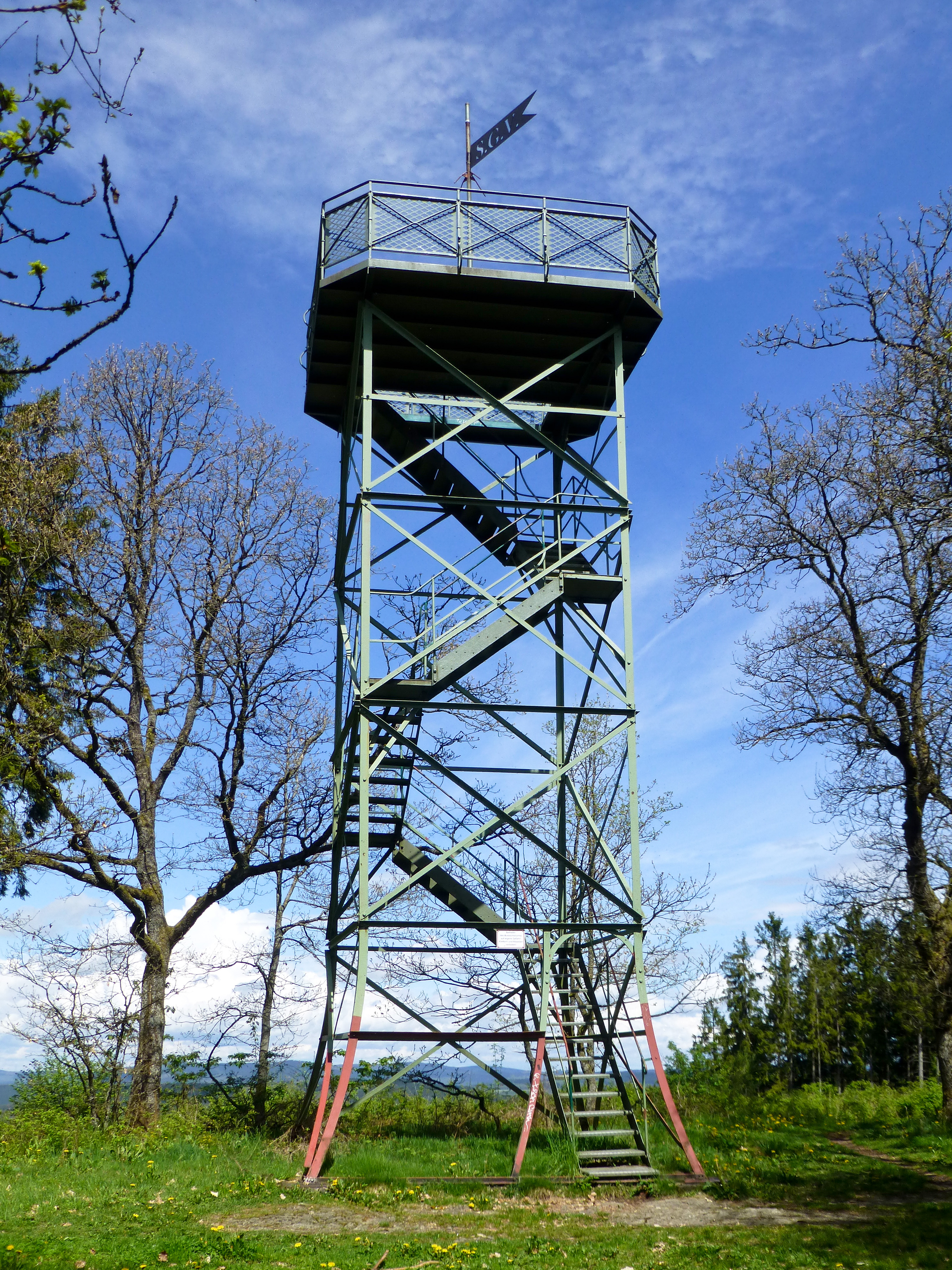 Rabenhainturm bei Volnsberg; Ansicht von Süden